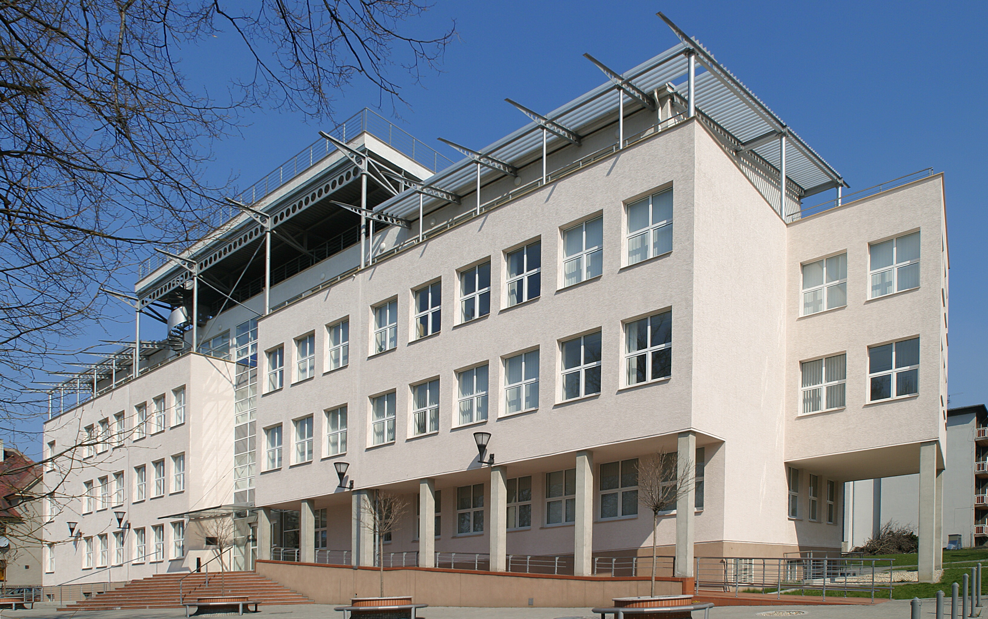 Ostrava OSU, Přírodovědecká fakulta, Chittussiho 983/10, 710 00 Ostrava.